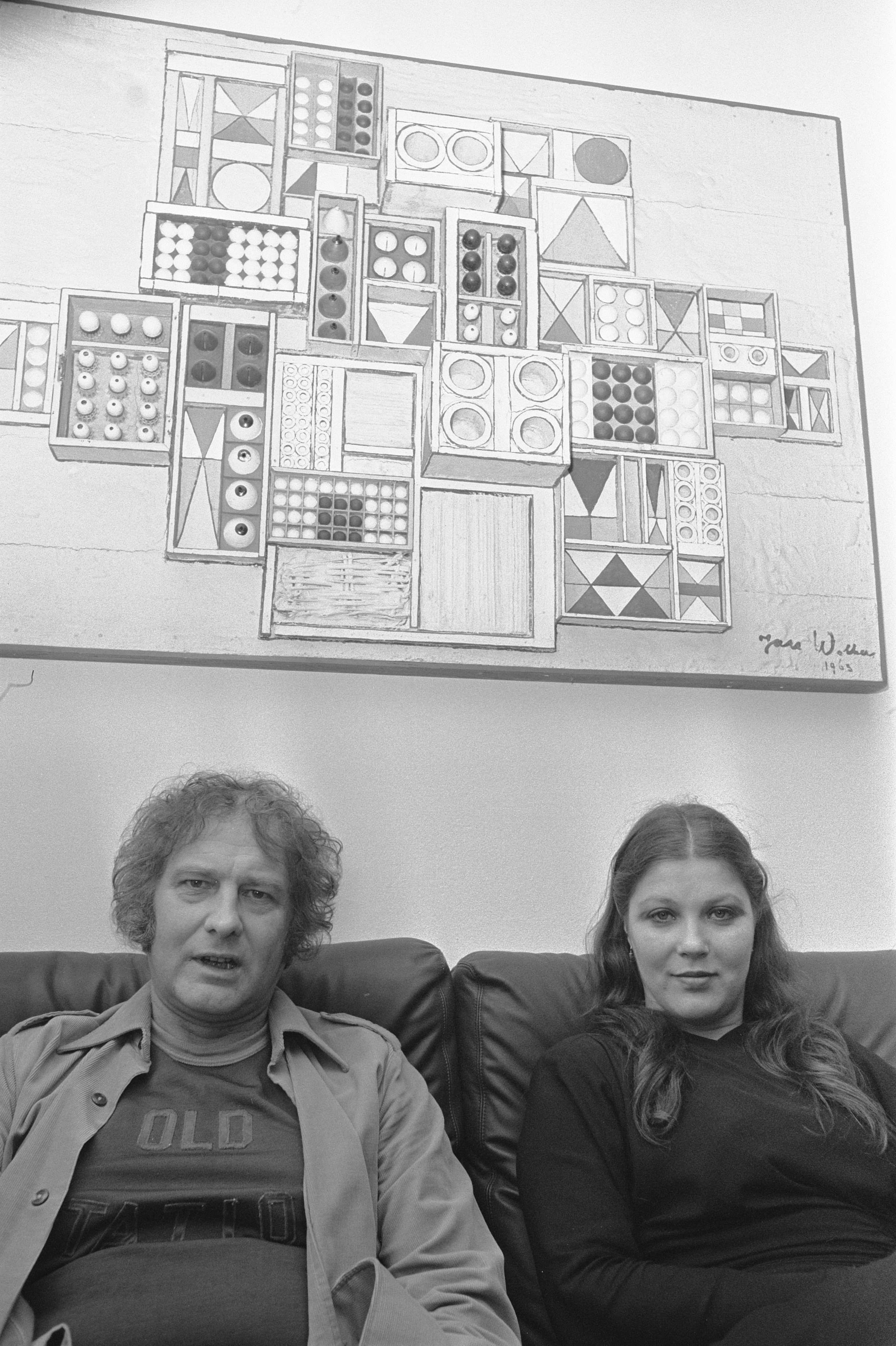 Jan Wolkers (opdracht Nieuwsblad van het Noorden); Wolkers (l) met vriendin Karina Gnirrep onder een van zijn schilderijen